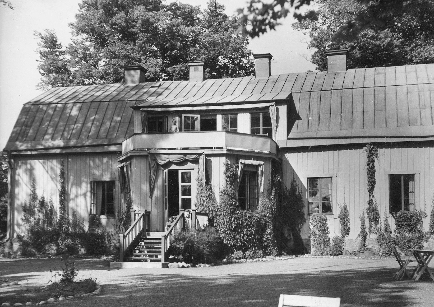 Fra Kumla herregård, Hanaviken utenfor Stockholm som er stilt til disposisjon for norske kvinner og barn. RA/PA-1209/Uc/68/4/S363